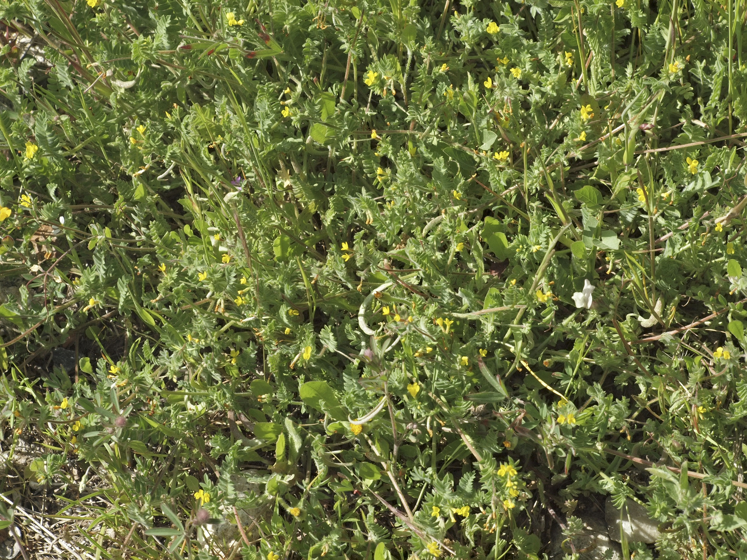 Ornithopus compressus. Losar de la Vera (Cáceres, España).